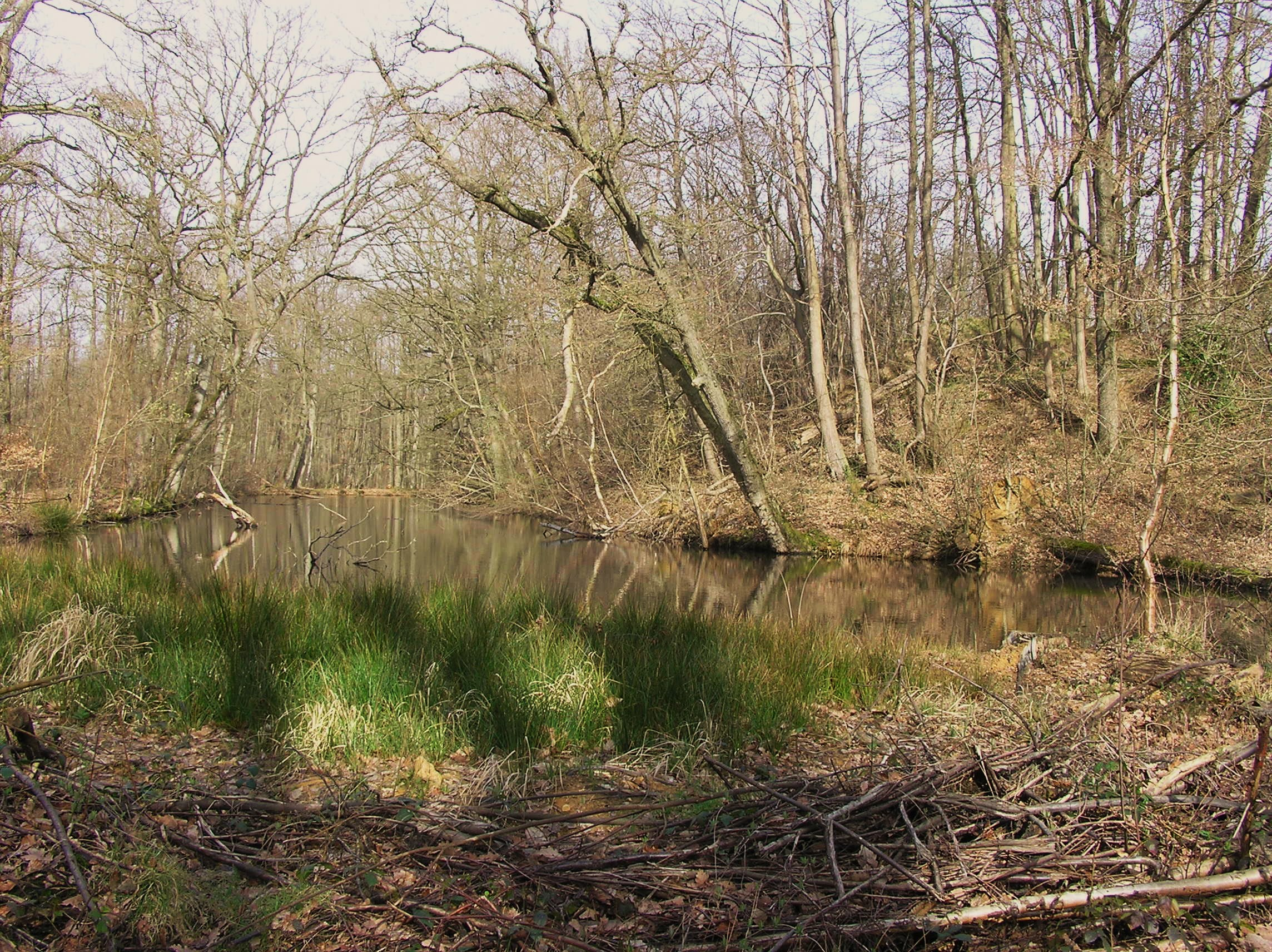 Etang du Fer à Cheval de La Redoute du Ravin de Bouviers